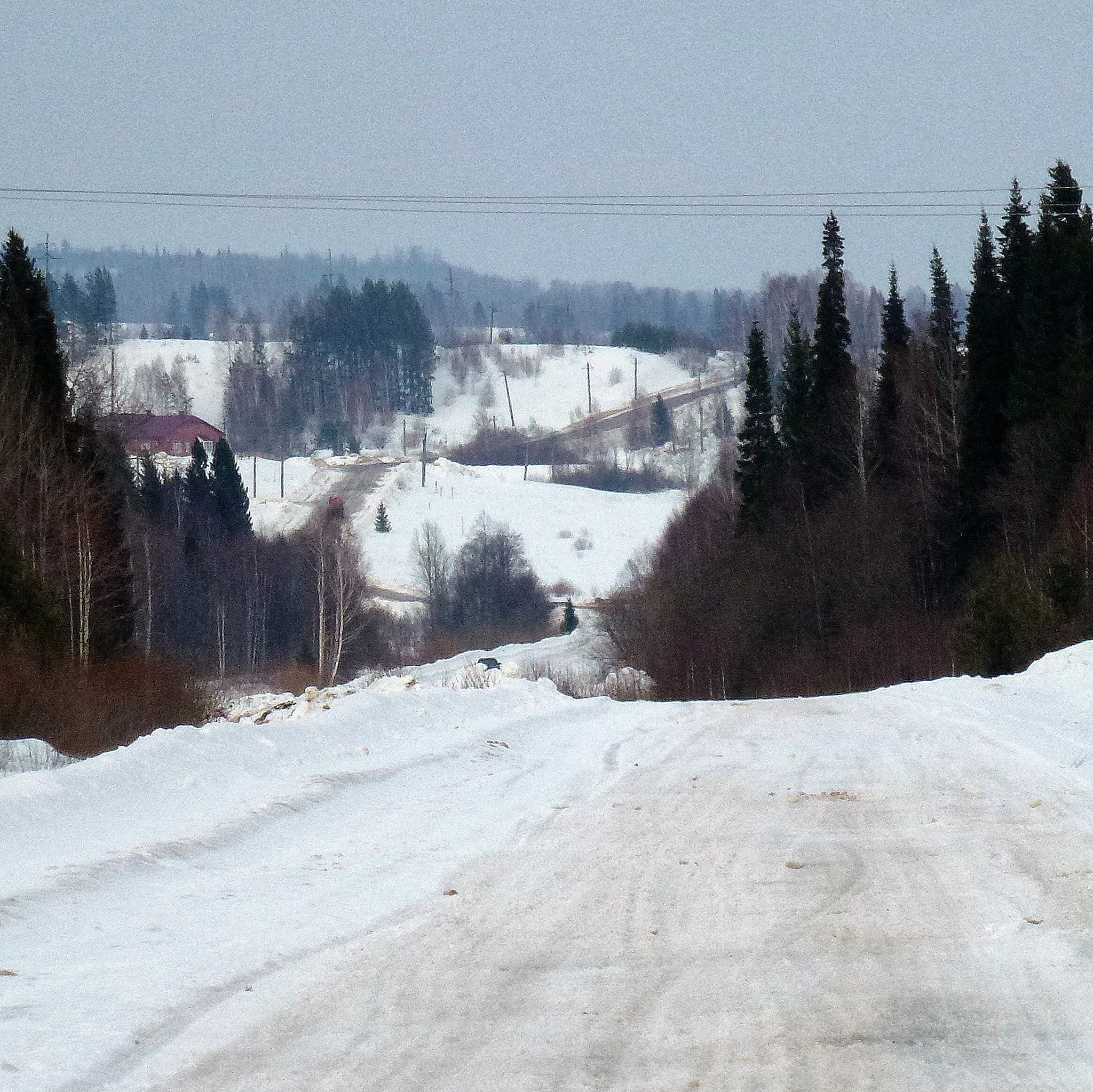 Окрестности Амировки